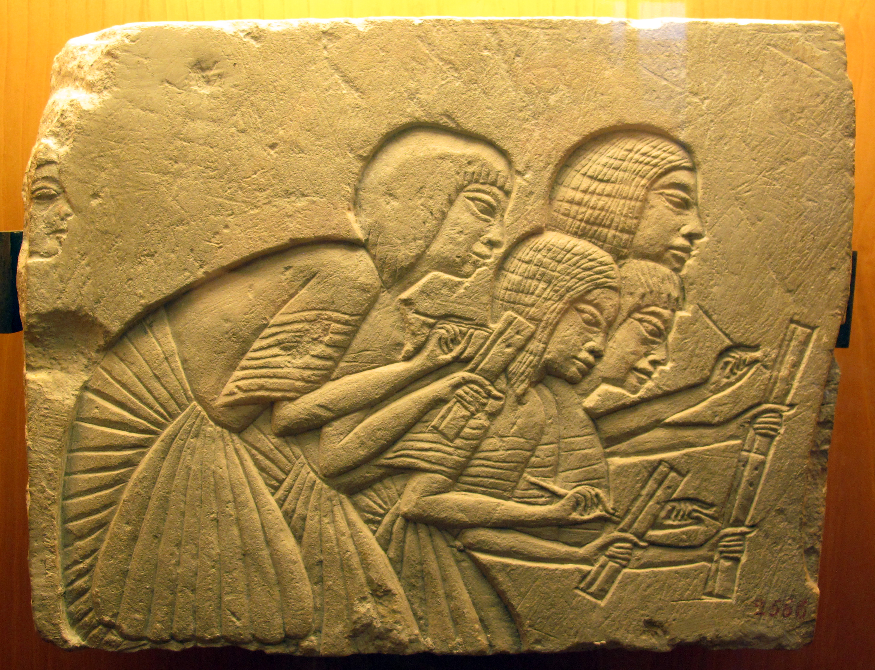 Ancient Egyptian art in the Museo archeologico nazionale (Florence)